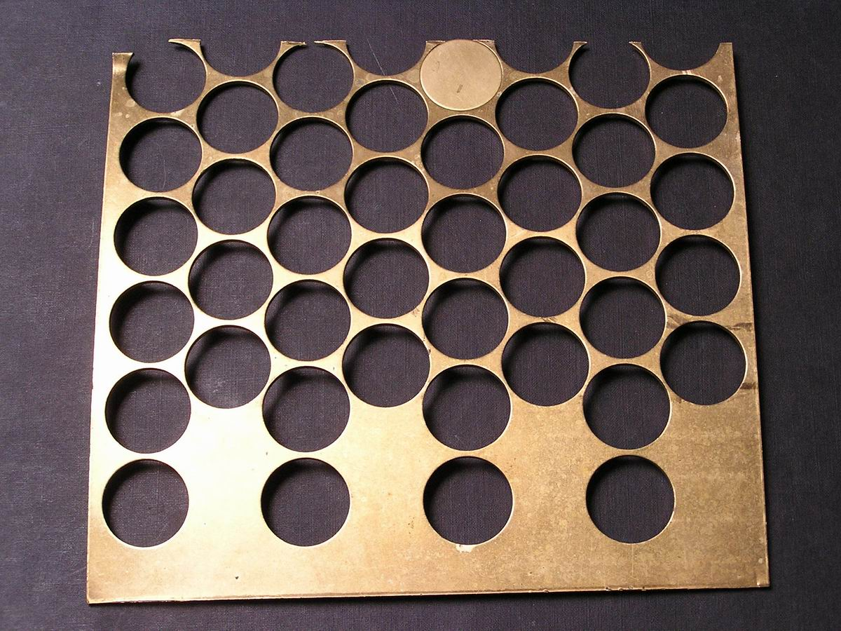 Ein Münzblech Quelle: [1] Fotograf/Zeichner: michel008 Sonstiges: Alle Abbildungen auf der oben genannten Seite sind gemeinfrei, siehe [2]